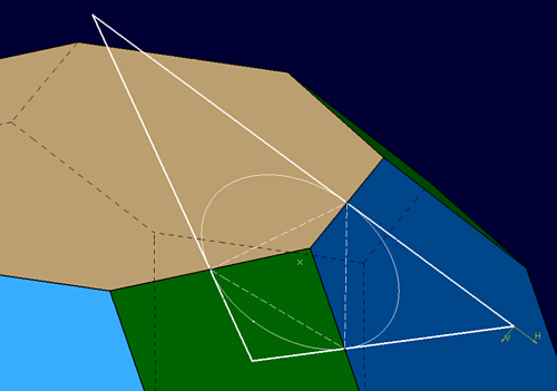 Konstruktion des Dreiecks für das Hexakisoktaeder am dualen Kuboktaederstumpf